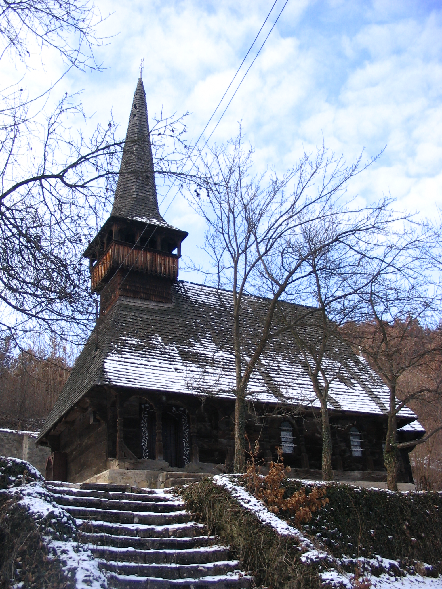 Biserica de lemn din Tămaşa